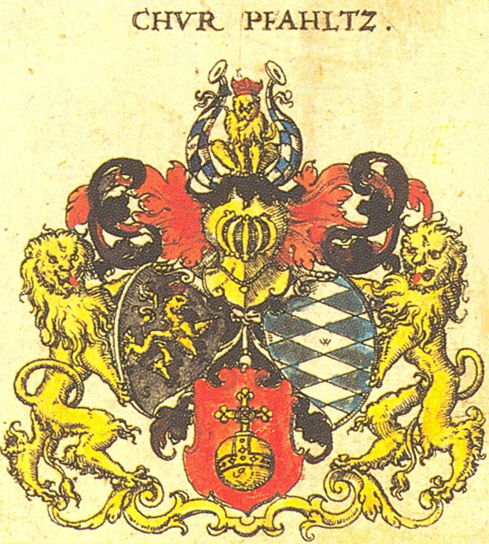 Siebmachers Wappenbuch, Blatt 3, Kurpfalz, 1605